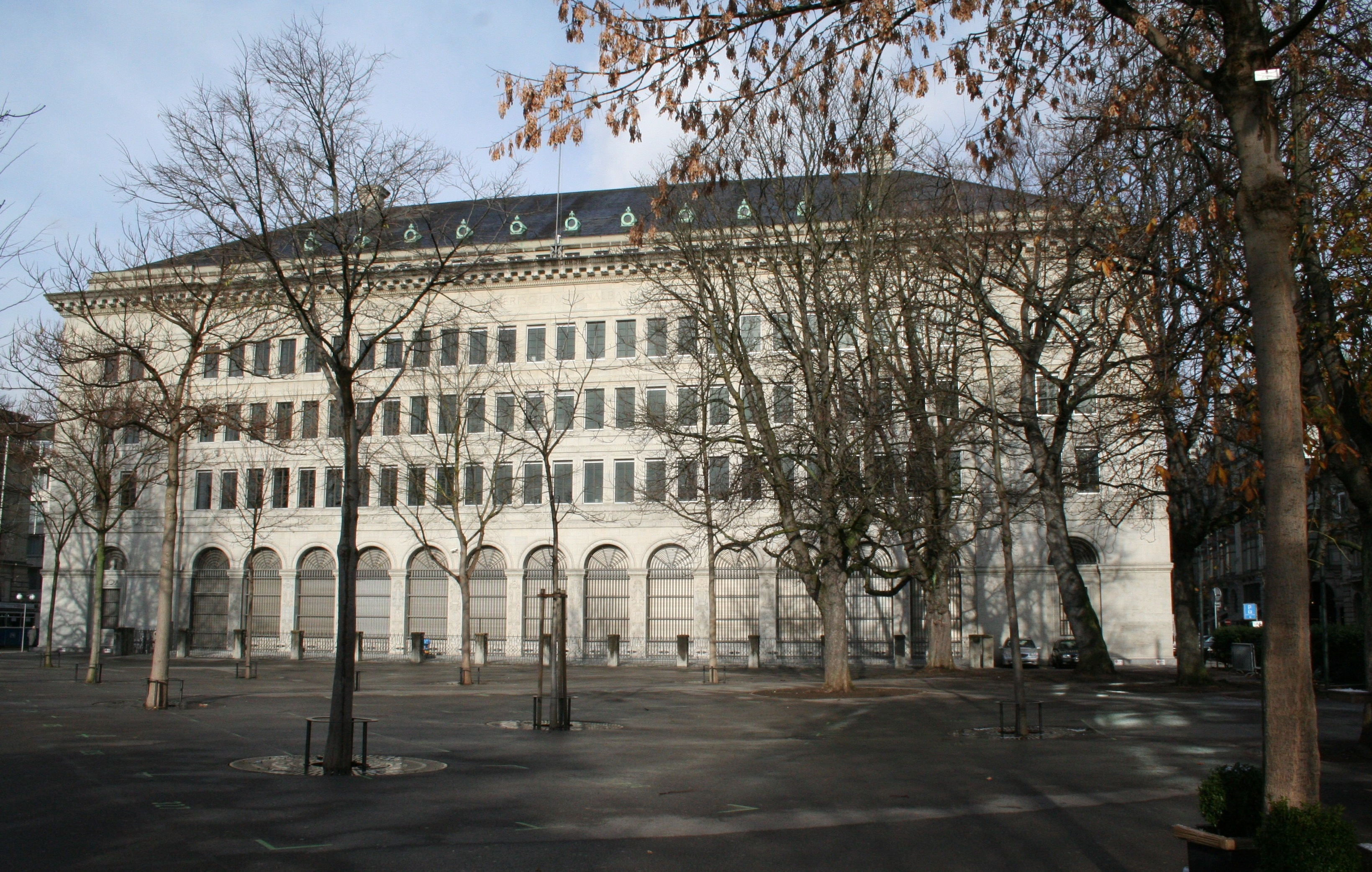 Gebäude der Schweizerischen Nationalbank in Zürich, Ansicht von Süden